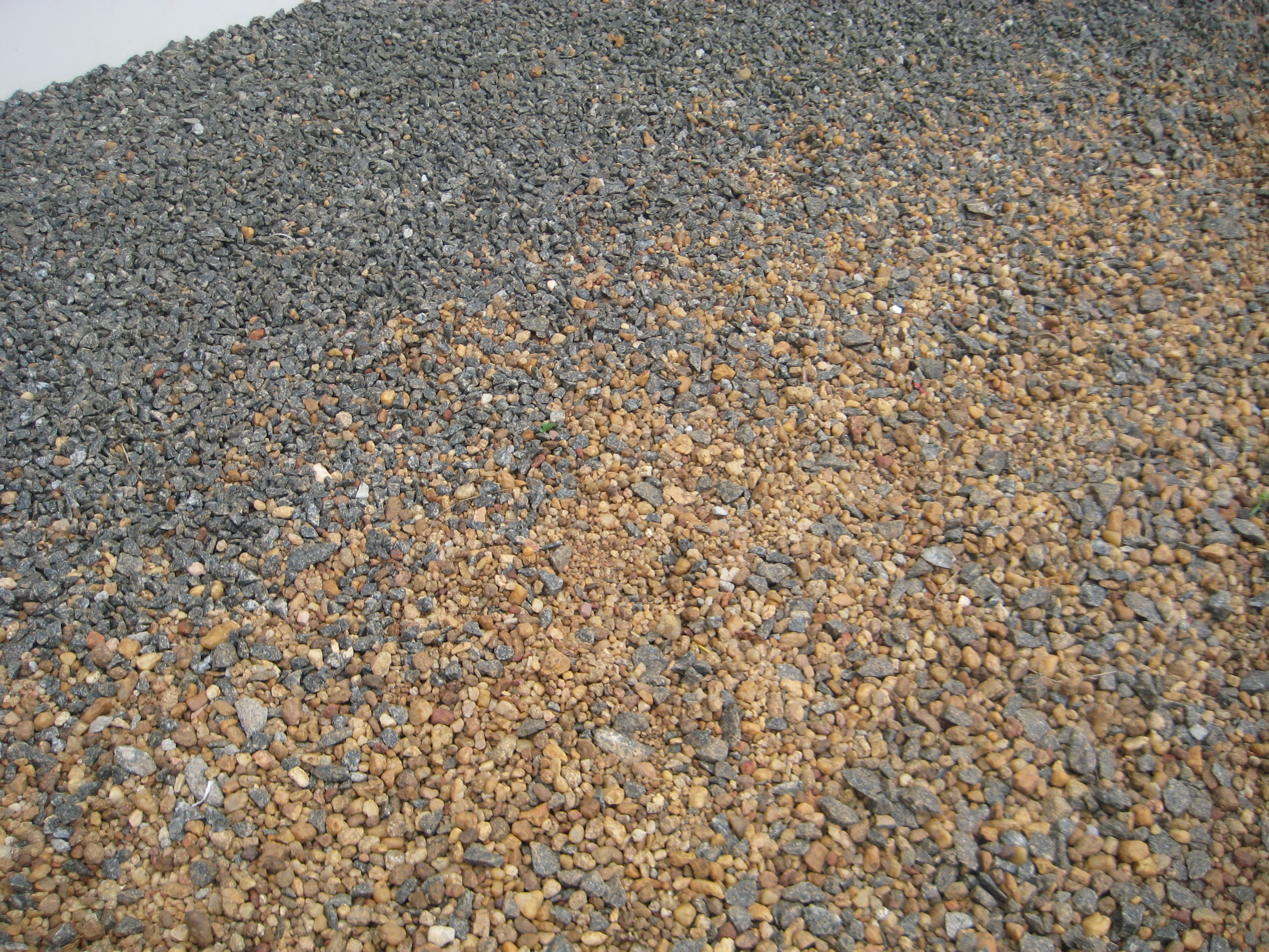 വളരെ ചെറിയ കല്ലുകളുടെ കൂട്ടത്തെയാണ് ചരൽ എന്ന് പറയുന്നത്. ഒരെണ്ണമാണെങ്ങിൽ "ചെറിയ" എന്ന വിശേഷണത്തോടെ ചെറിയ കല്ലെന്നും ബഹുവചനമായിട്ട് ചരലെന്നും പറയുന്നു. മണ്ണിന്റെയിടയിൽ കാണുന്ന കല്ലുകൾ മണ്ണിന്റെ നിറത്തോട് സാമ്യമുള്ളതായിരിക്കും. എല്ലാവിധ ചെറിയ കല്ലുകളും ചരൽ എന്ന വിഭാഗത്തിലാണ് വരുന്നതെങ്ങിലും മണലിൽ കാണുന്ന കല്ലുകളെ വെള്ളാരം കല്ലുകളെന്നും കരിങ്കല്ല് പൊട്ടിക്കുമ്പോൾ കിട്ടുന്ന ചെറിയ കല്ലുകളെ കരിങ്കൽ ചീളുകളെന്നും (ജല്ലി, മെറ്റൽ) പറയുന്നു. വളരെ ചെറിയ കല്ലാണെങ്ങിൽ, ഇതിനേയും ചരലെന്ന് പറയാറുണ്ട്. വലിയ കല്ലുകളെ ചരലെന്ന് ഉപയോഗിക്കാറില്ല. വലുപ്പത്തിന് പ്രത്യേകിച്ച് അളവുകൾ പറയാൻ സാധിക്കില്ലെങ്ങിലും സാധാരണയായി രണ്ടോ മൂന്നോ സെന്റിമീറ്ററിൽ കുറവ് വലുപ്പമുള്ള കല്ലുകളെയാണ് ചരൽ എന്ന് പറയുന്നത്. ഒരു പരിധിവരെ കല്ലിന്റെ ആകൃതിയും ചരലെന്ന് പറയുന്നതിന് ഘടകമാകുന്നത് കാണാറുണ്ട്. ഉരുണ്ട വളരെ ചെറിയ കല്ലുകളെയാണ് ചരലെന്ന് പറയുന്നത്.